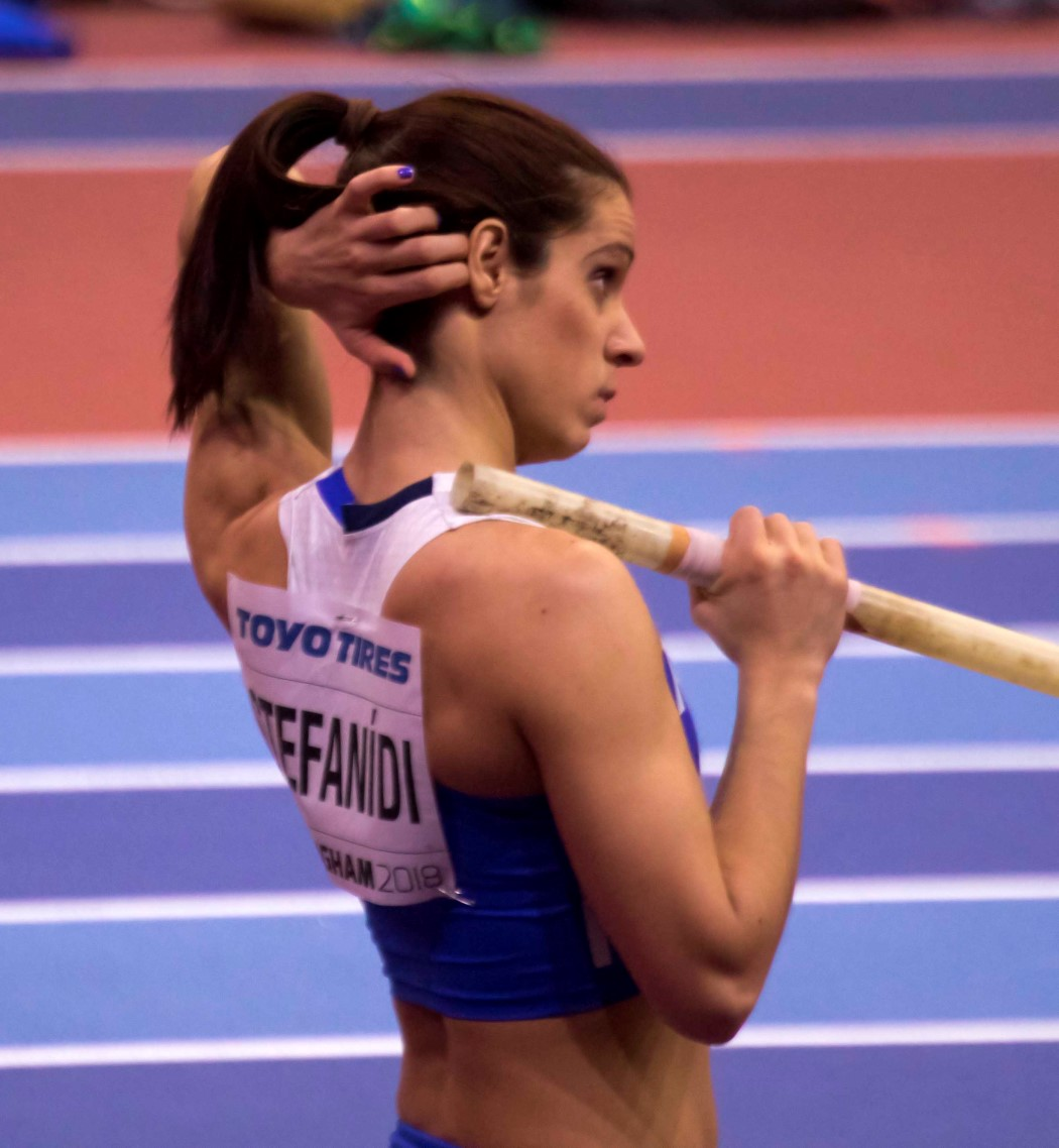 WK3B0159 polsstok dames stefanidi